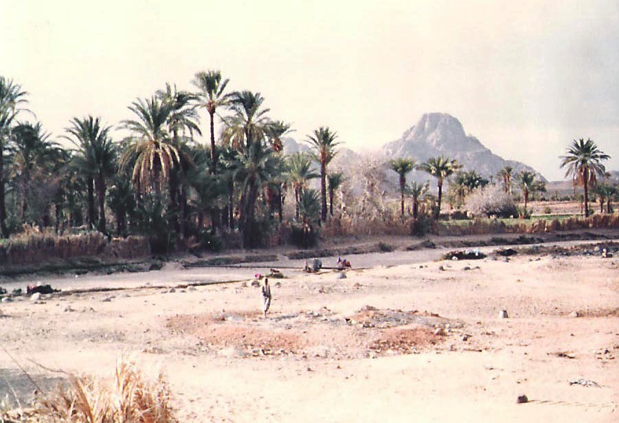 Idelès dans le Hoggar (wilaya de Tamanghasset, Algérie)